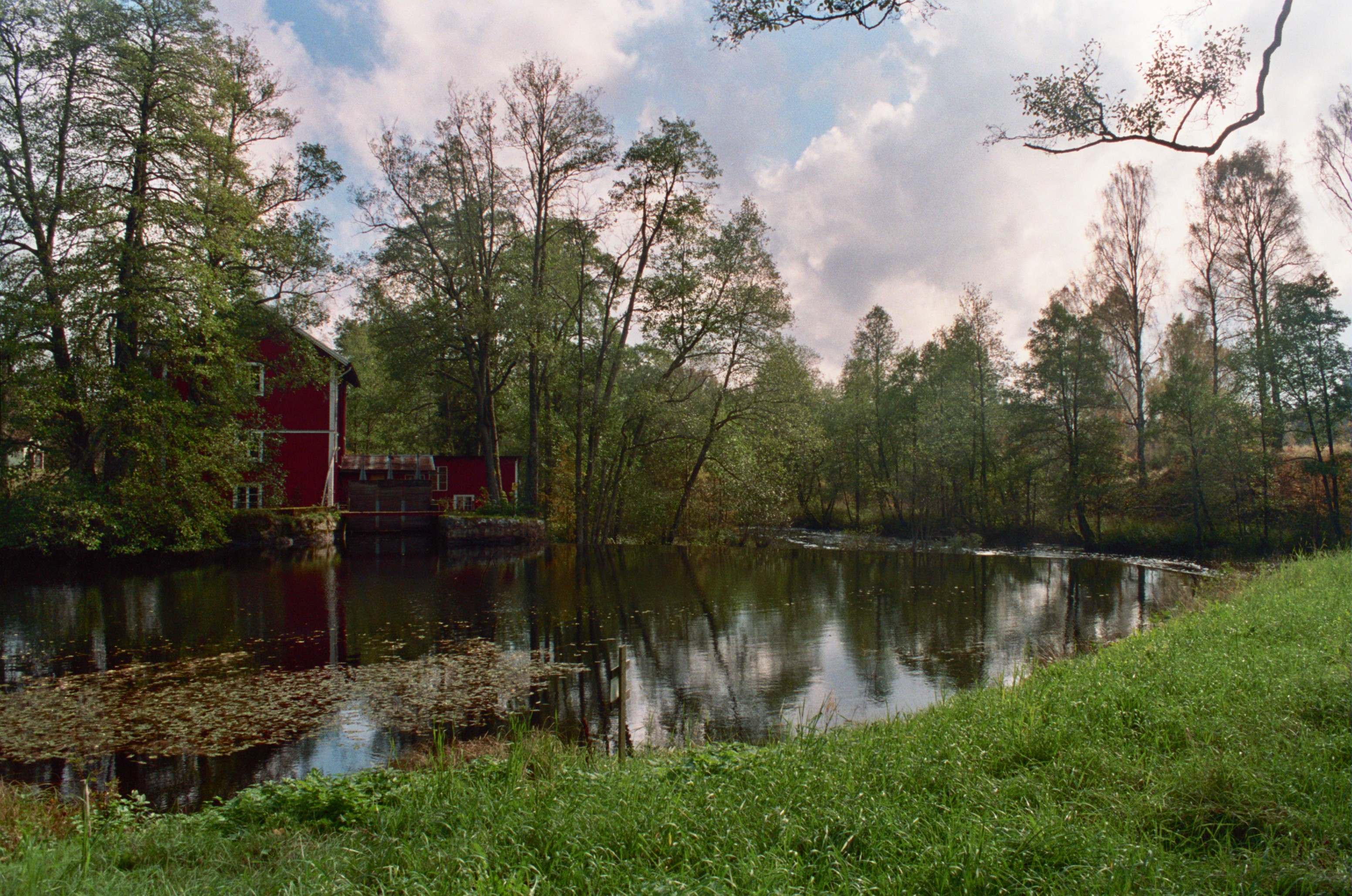 Härån, Småland